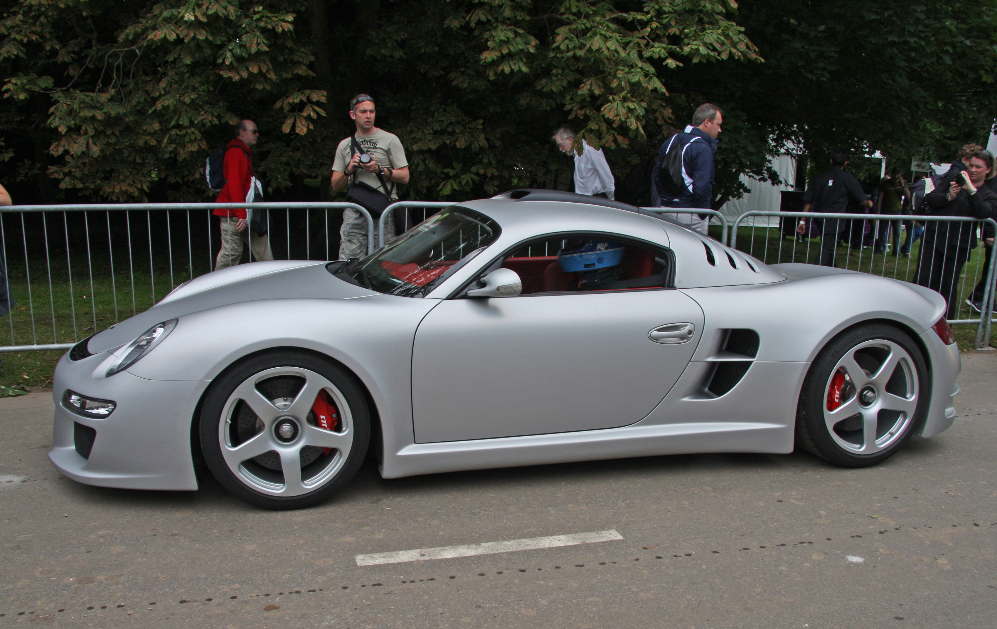 An Ruf CTR3.